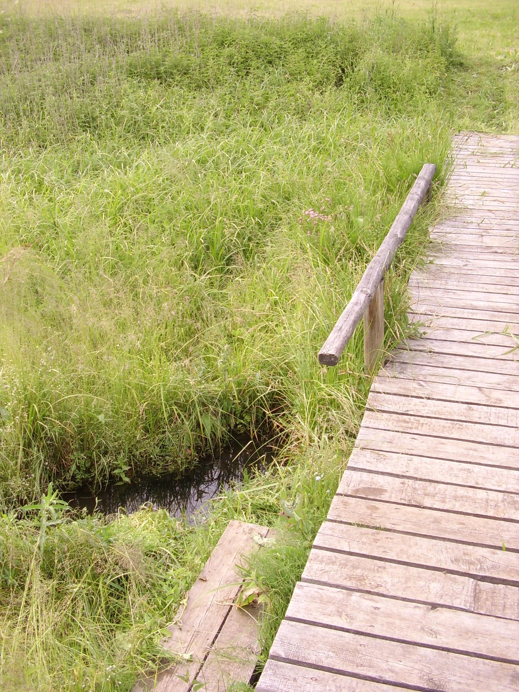 Bobos daržo šaltinis Margionyse.